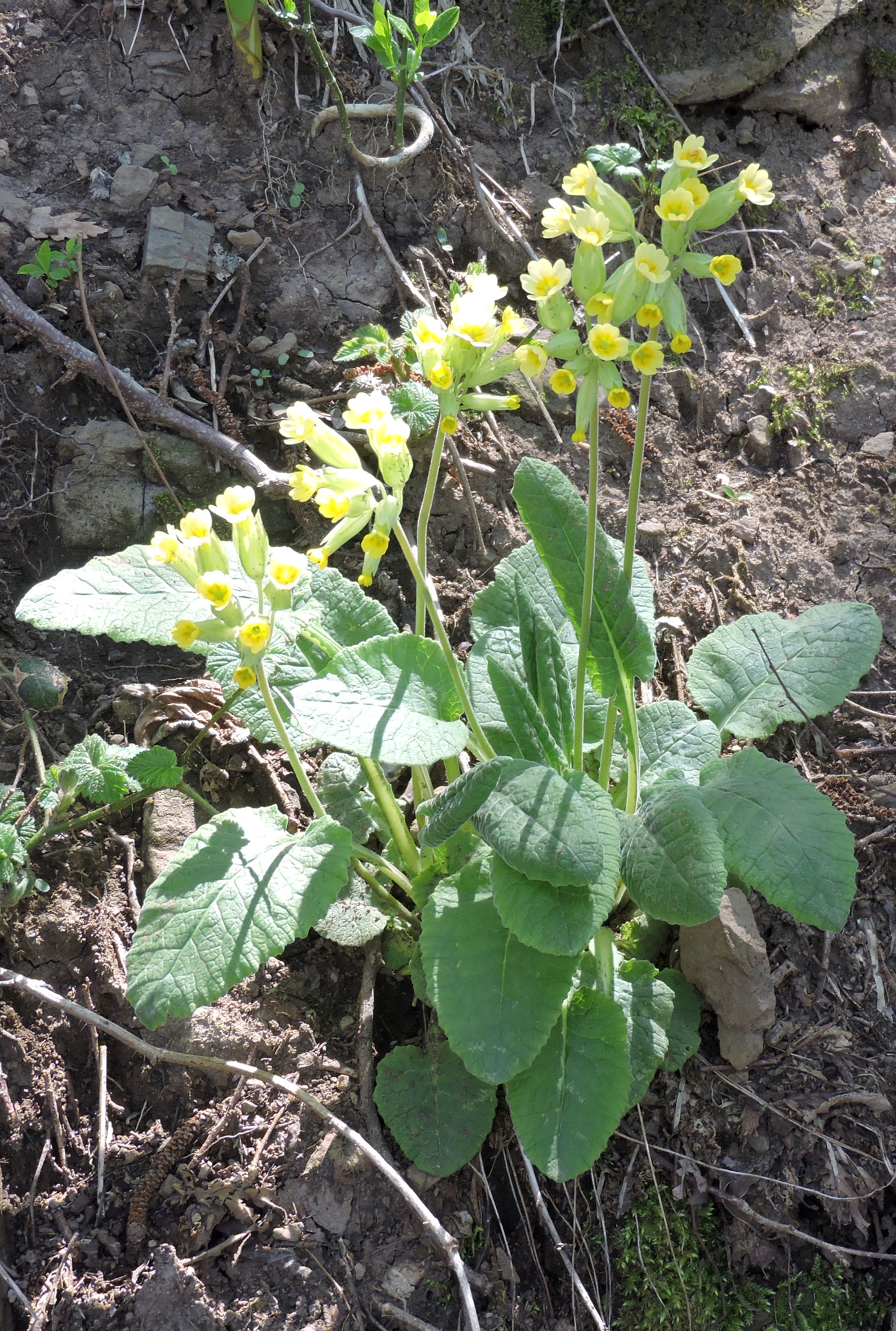 Val Noci - Torrente Geirato - Alpesisa (Q55317038)